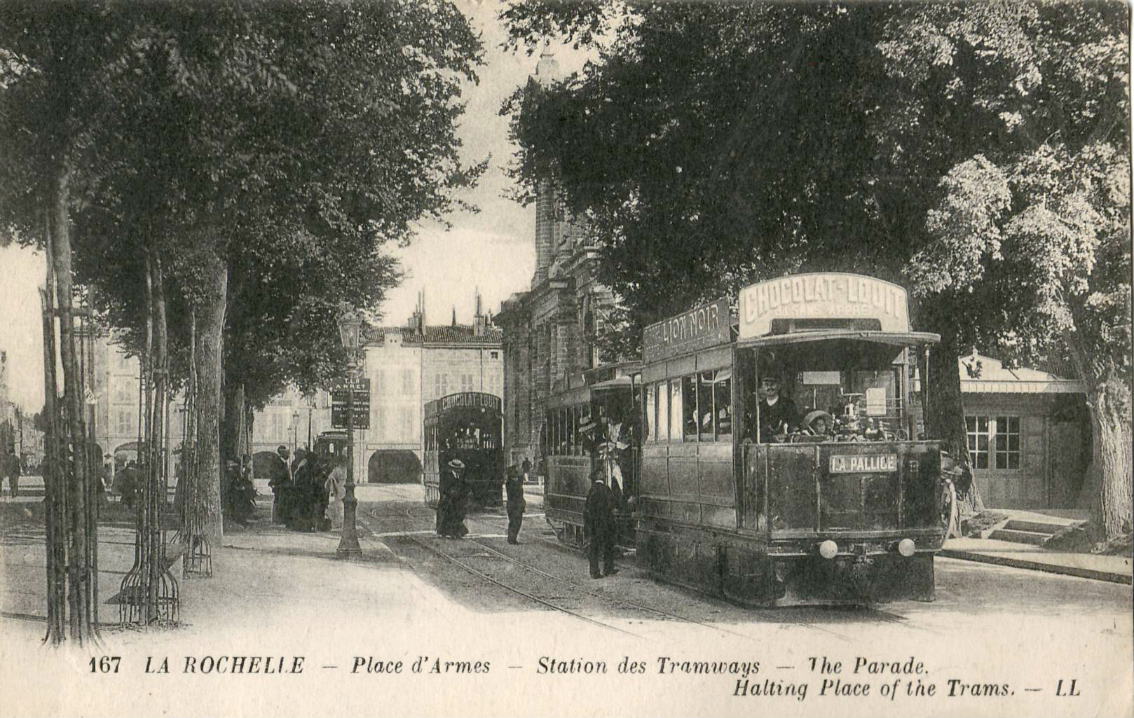 Carte postale ancienne éditée par LL, n°167 : LA ROCHELLE - Place d'Armes - Station des Tramways